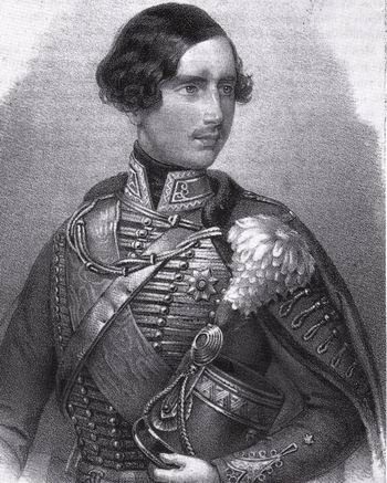 Friedrich Wilhelm Georg Adolf